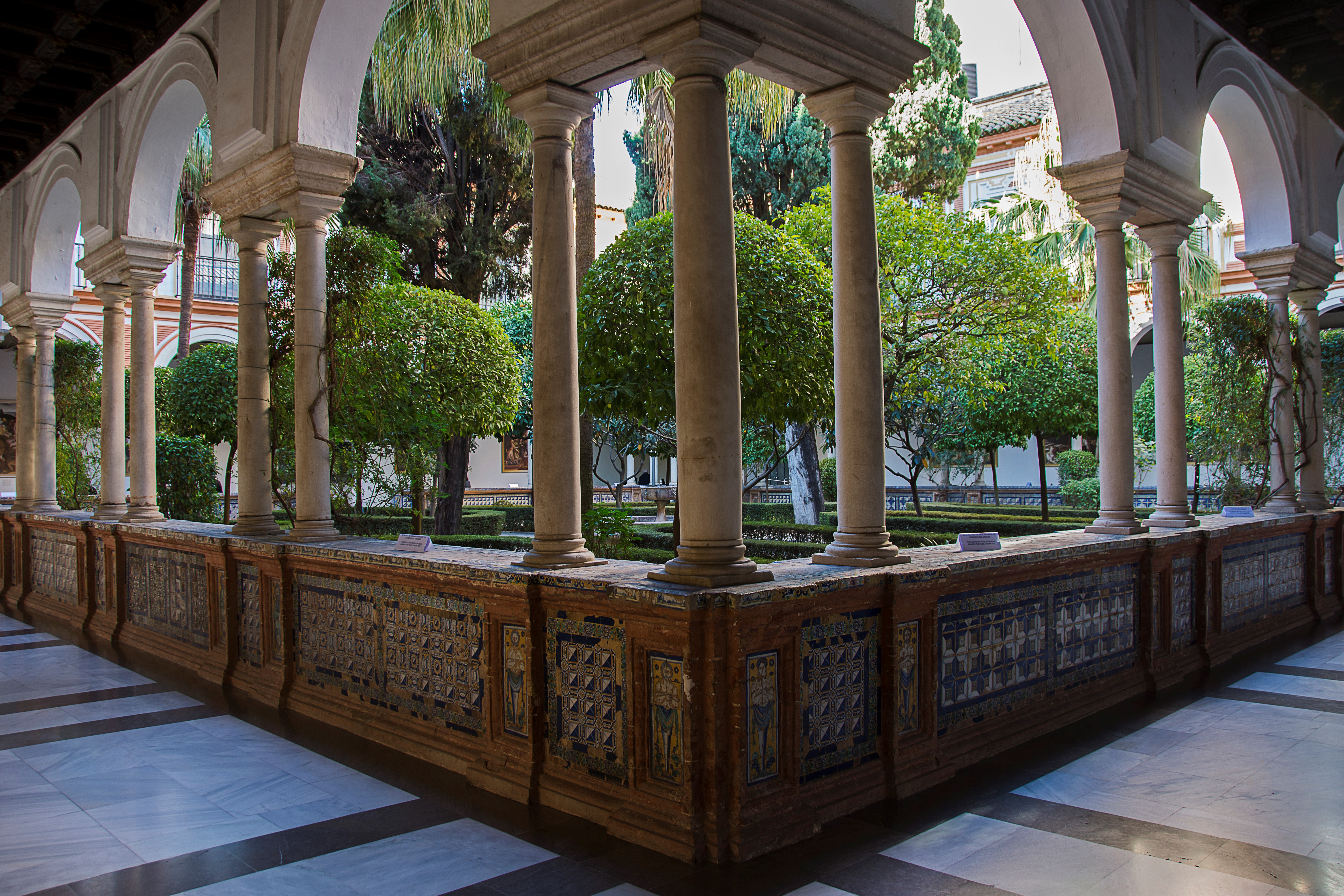 Claustro grande del Museo de Bellas Artes de Sevilla